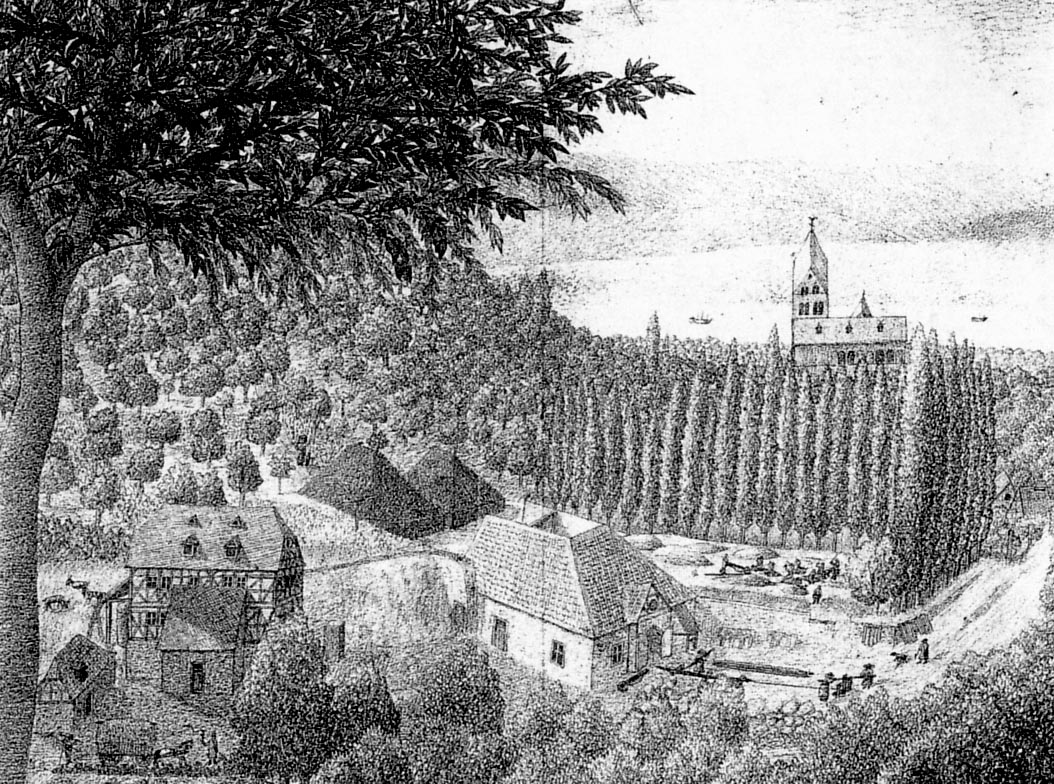 Obere Hütte in Bendorf an der Mühlenstraße